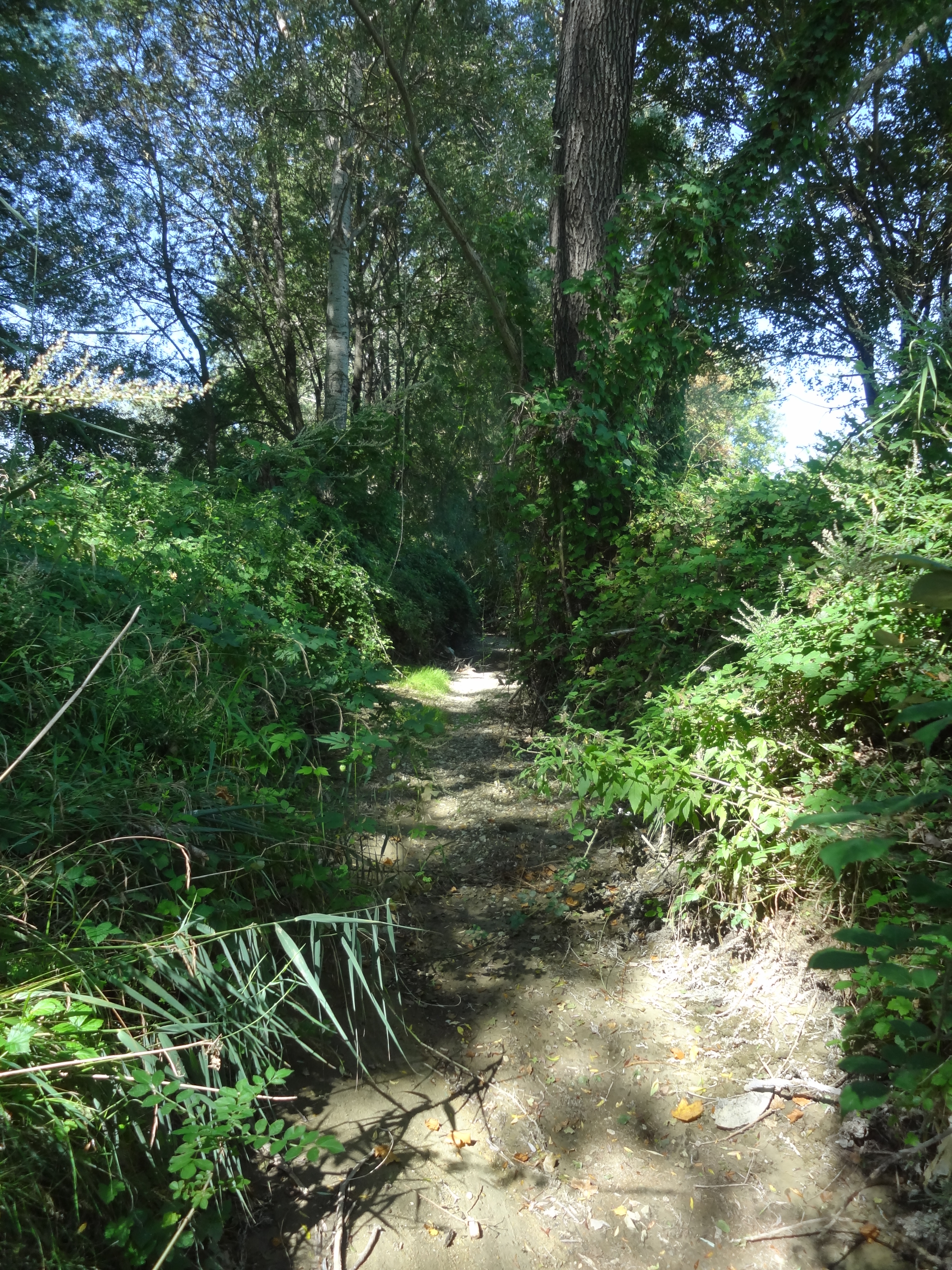 Lit de l'Encrême à Céreste, sous la nationale 100